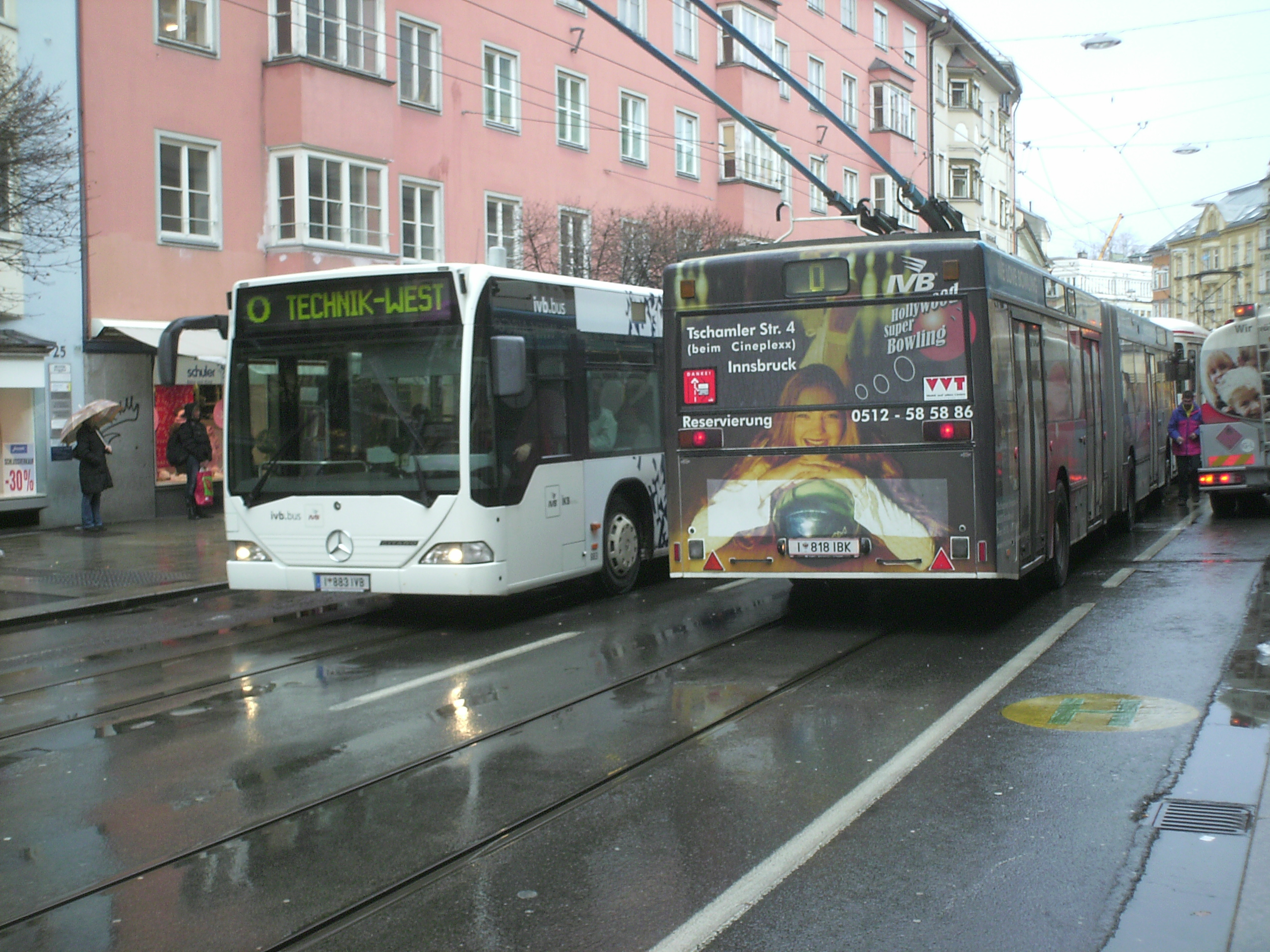 Treffen eines alten O-Bus und eines neuen Dieselbusses der IVB